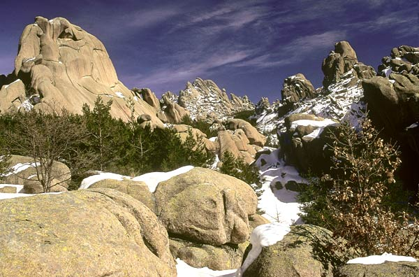 Vista de La Pedriza en invierno (Sierra de Guadarrama), España.